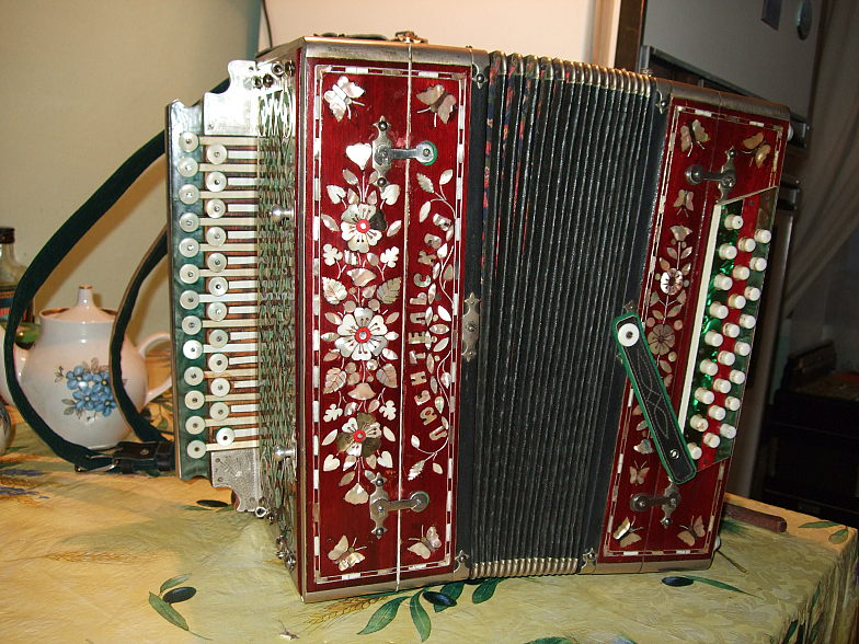 Русская гармонь